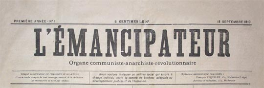 Le 18 septembre 1910, sortie à Liège, Belgique, du premier numéro du journal "L'Emancipateur" Organe communiste - anarchiste - révolutionnaire.Le journal sera édité à partir du numéro 24 par le groupe "Les chercheurs de Vérité". Fin en 1914